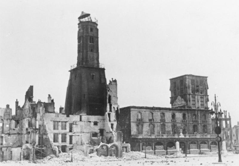 Calais. Durch Stukas zerstörte Häuser und Kirche. 1.6.1940, nachmittags